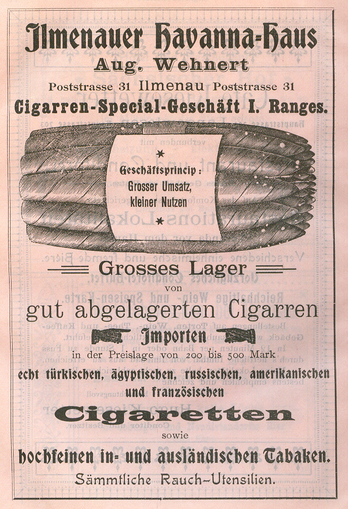 Werbung für ein Tabakgeschäft in Ilmenau